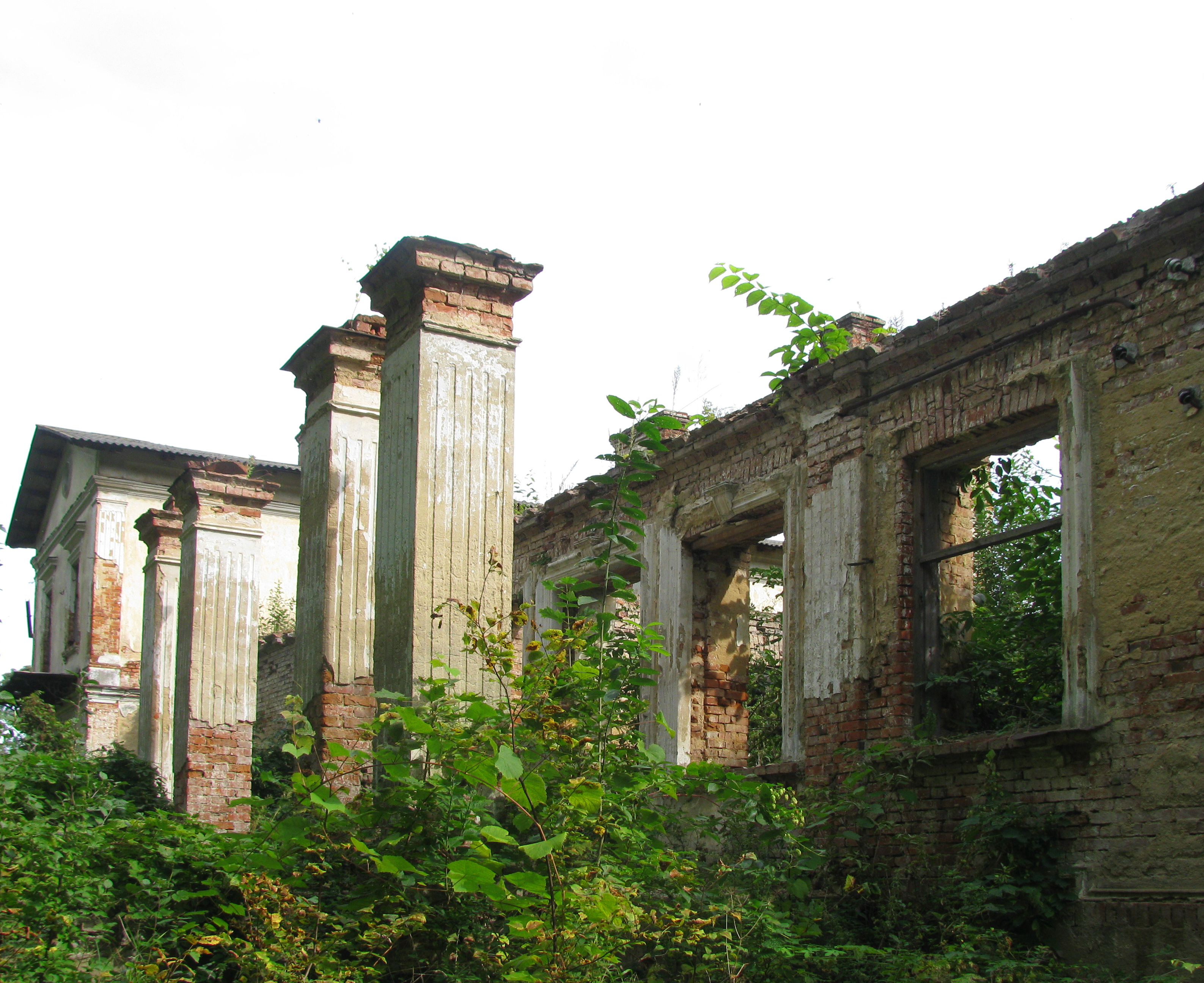 Беларуская (тарашкевіца): Рэшткі сядзібна-паркавага комплексу. в. Каштанаўка This is a photo of Belarusian heritage monument. Reference number: 113Г000614 ( WLM)